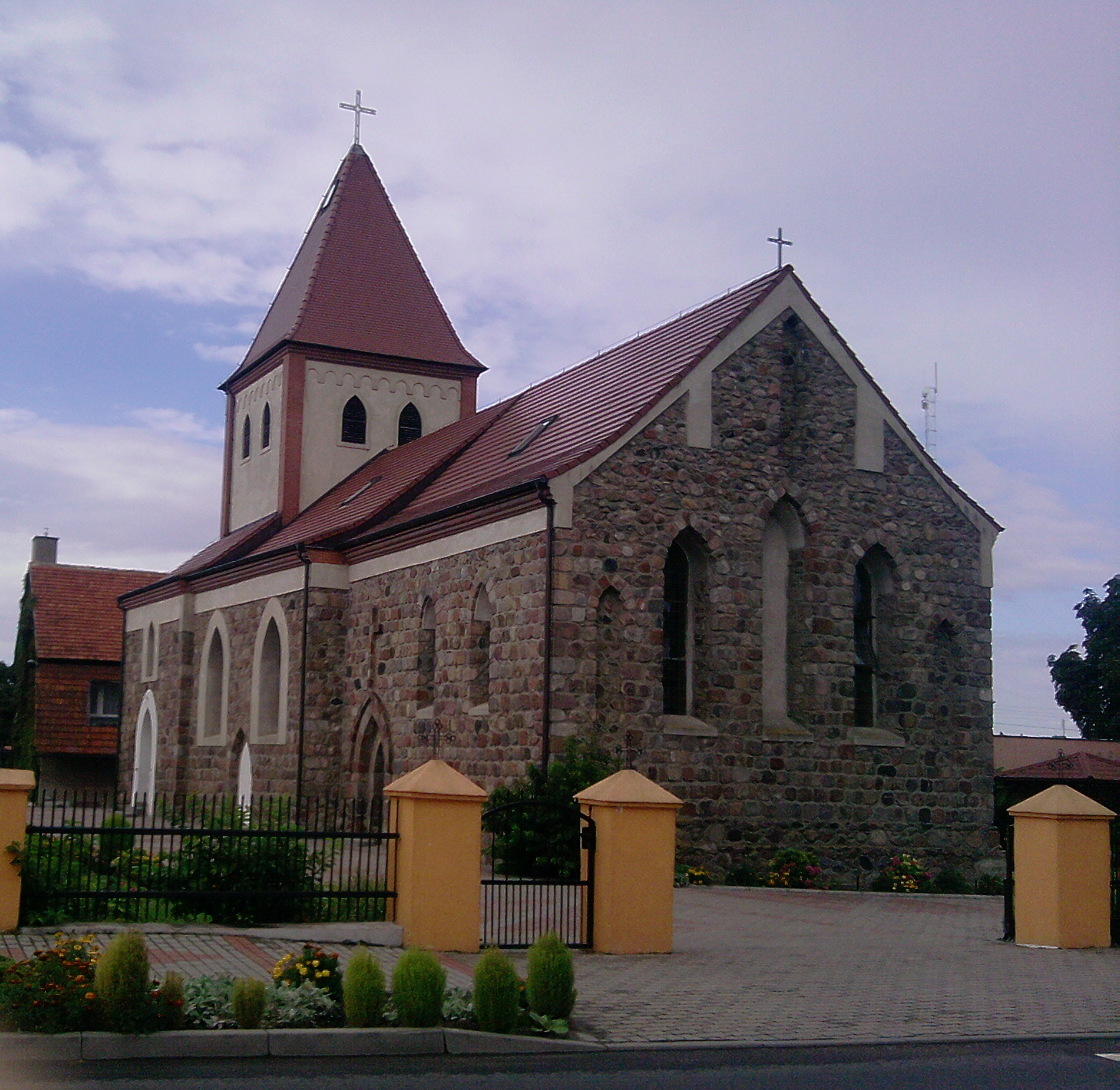 Kowalów - kościół fil. pw. śś. Piotra i Pawła z XIII w., 1804 r.